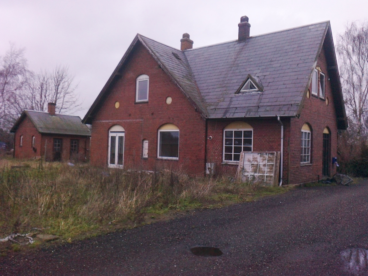 Skovby Station fra sporsiden